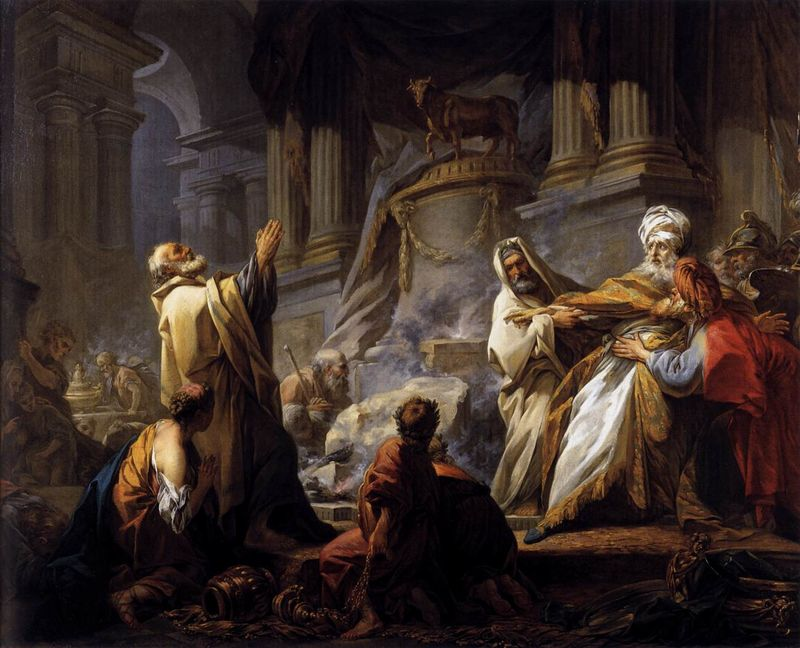 prix de Rome 1752